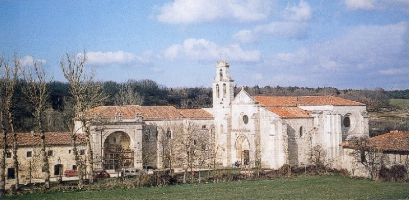 Date du cliché : septembre 2000. Romanesque monastery of San Juan de Ortega, in Burgos province, Spain Monasterio de San Juan de Ortega. Provincia de Burgos, España. Románico.